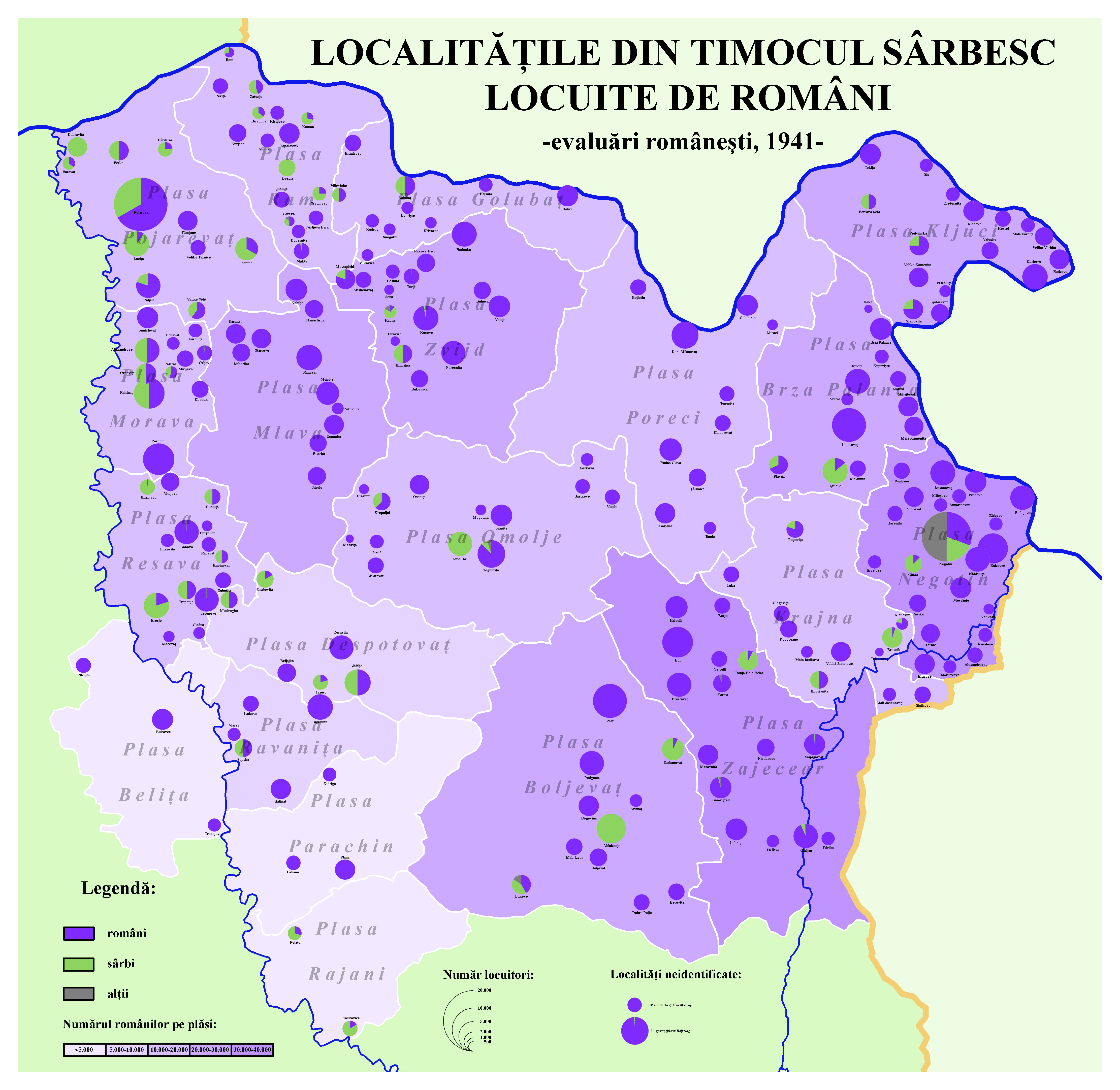 Harta localităţilor din Timocul sârbesc locuite de români, după evaluări româneşti din 1941